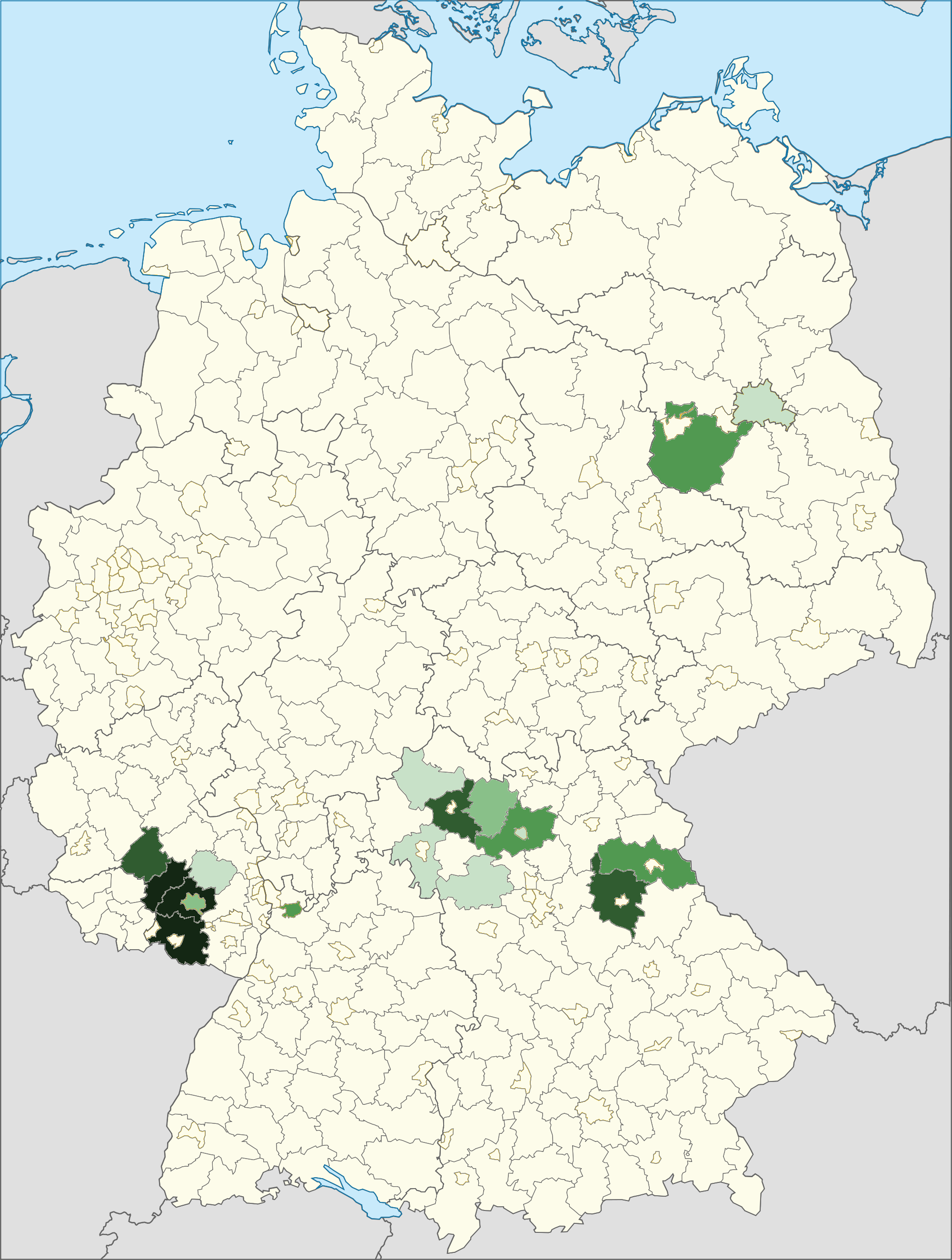 Karte der Personen mit US-amerikanischer Staatsangehörigkeit und deren relativer Häufigkeit in den Landkreisen 2014. Dunkelgrün: häufigste ausländische Staatsangehörigkeit in diesem Kreis, hellgrün: fünfthäufigste ausländische Staatsangehörigkeit in diesem Kreis, weiß: sechsthäufig oder weniger. Quelle: Ausländerzentralregister, Stand 31. Dezember 2014. Saarland: keine Daten auf Kreisebene (dargestellt ist die Landesebene).